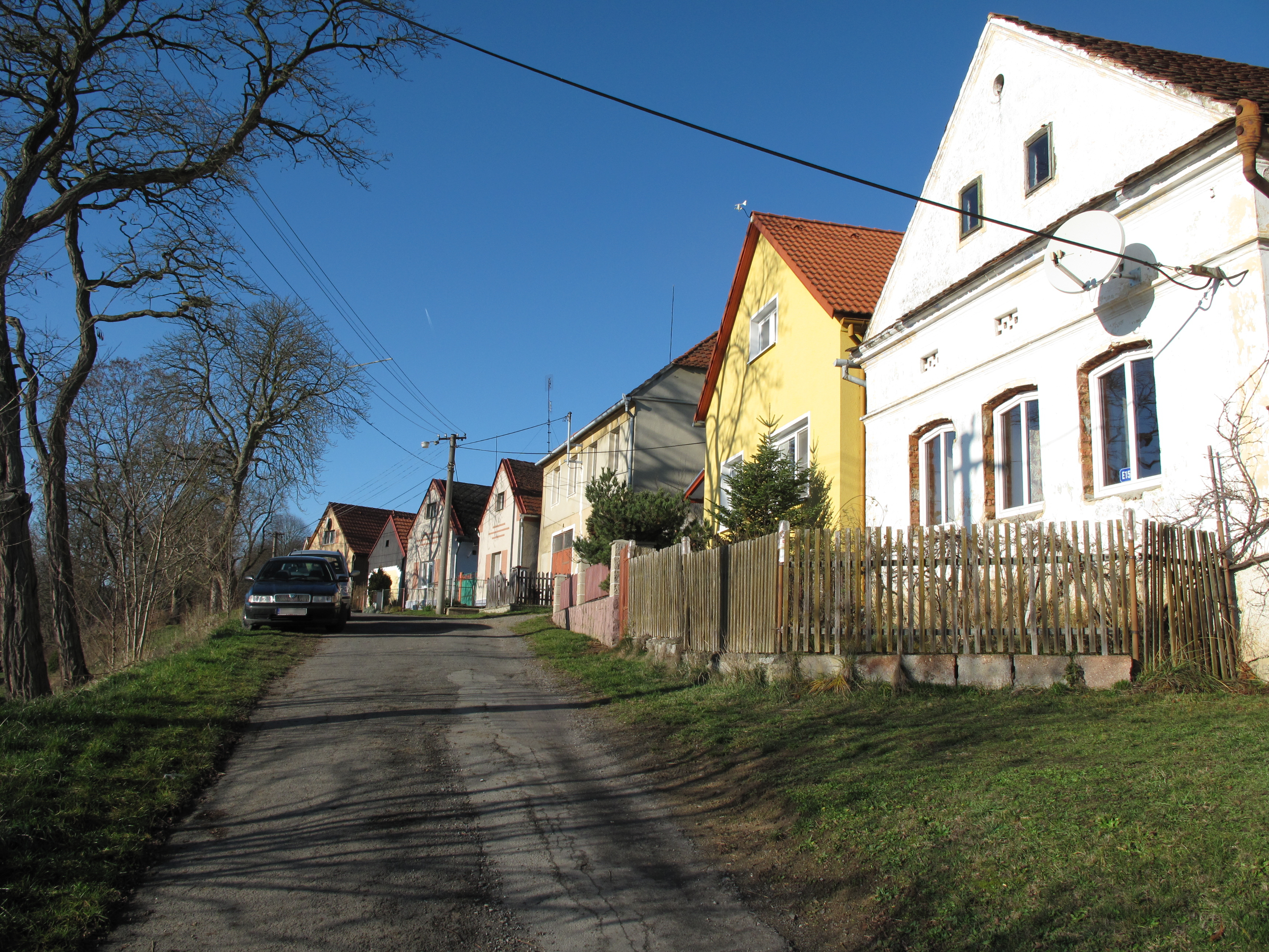 Domy v Čelákovech. Okres Plzeň-jih, Česká republika.